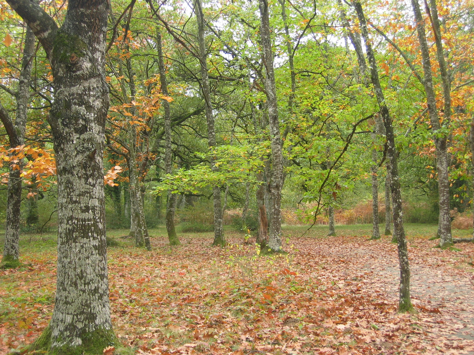 Area Natural Recreativa de Orgi, foto tomada en otoño, el suelo cubierto de las hojas de roble This is a photography of a Special Area of Conservation in Spain with the ID: ES2200043. Natura2000 entry, EEA entry